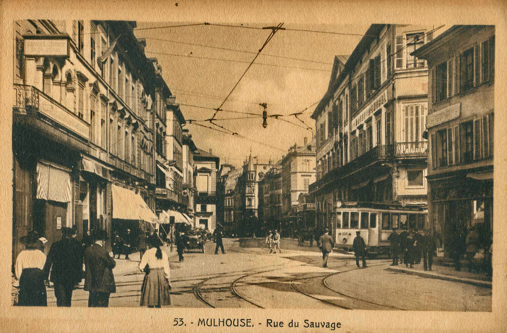 Carte postale ancienne éditée par Cigogne, n°53 : MULHOUSE - Rue du Sauvage Vue de la motrice 221 de l'ancien tramway de Mulhouse Sur la droite le grand immeuble est l'Hôtel Central, démoli depuis.